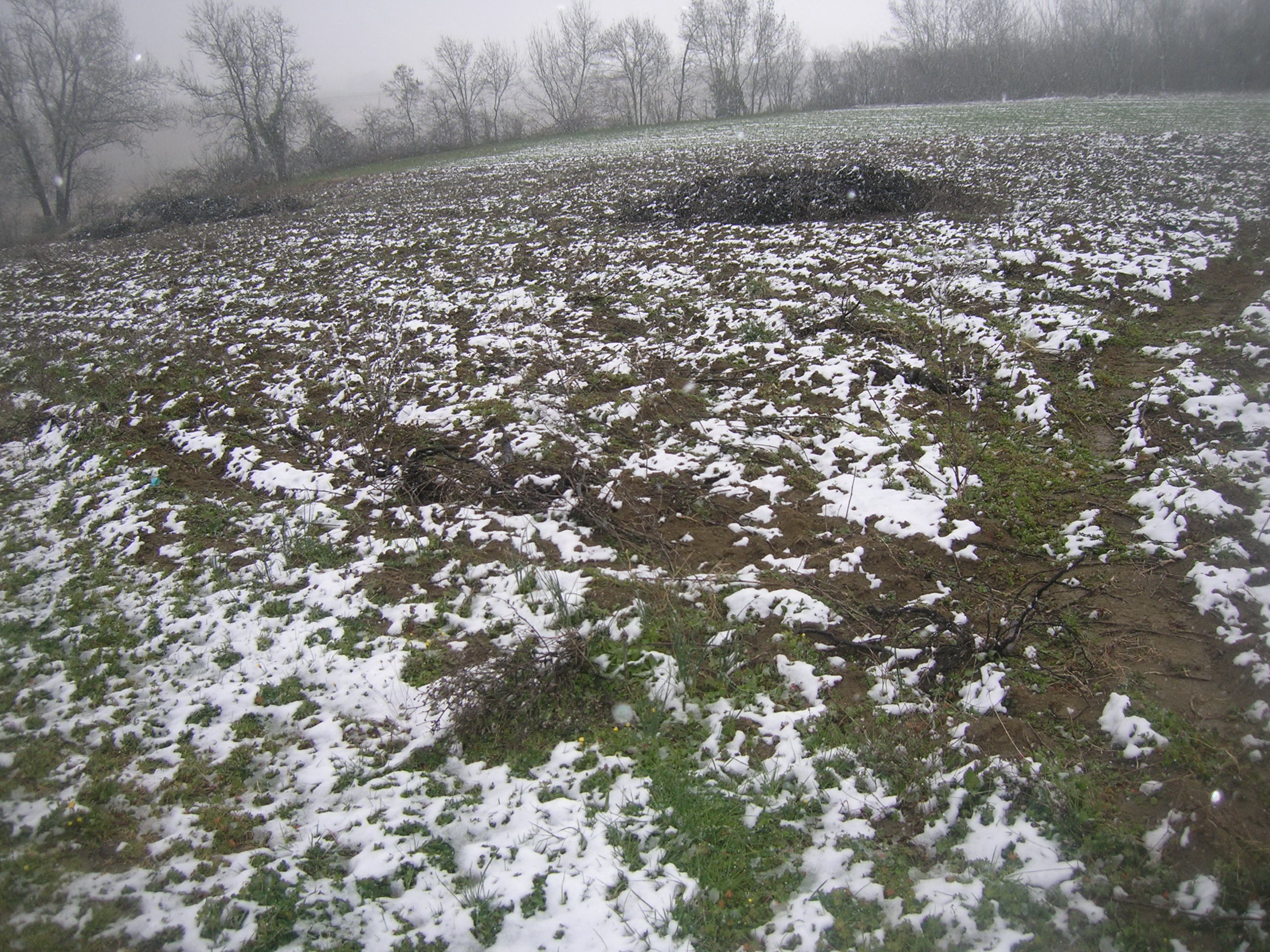 Vigne arrachée. Vignoble de Gaillac, commune de Cestayrols, route de Cahuzac sur Vère. Photo prise le 8 mars 2010 à 15:30 sous la neige.